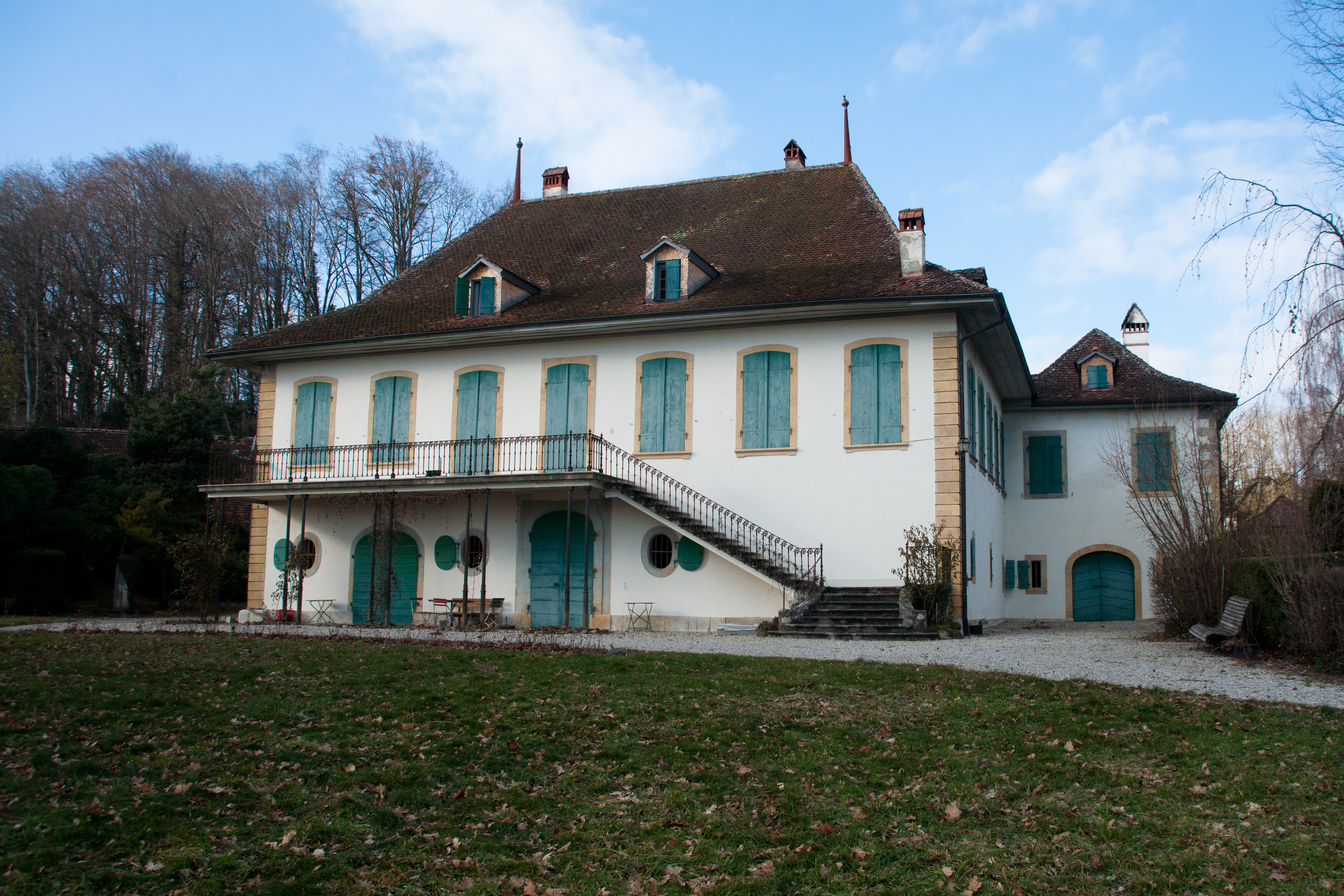 Château de Guévaux, canton de Vaud, Suisse.